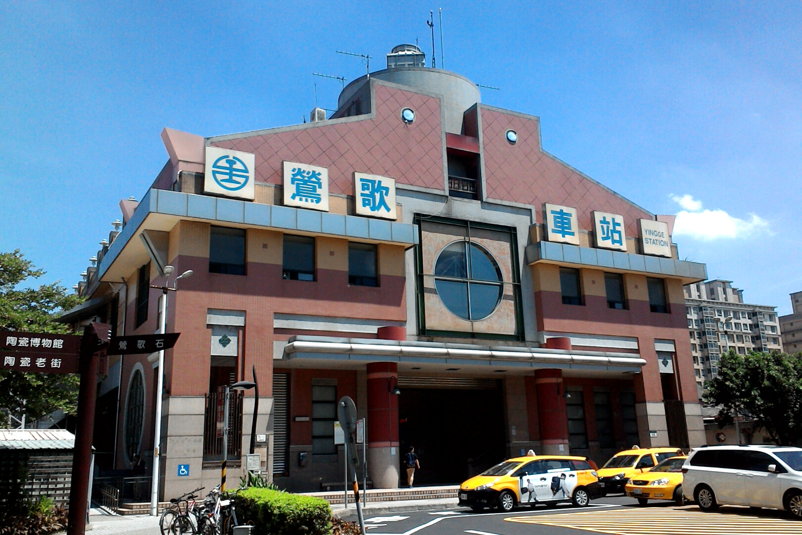 台鐵鶯歌車站,新北市鶯歌區中部地區東鶯里